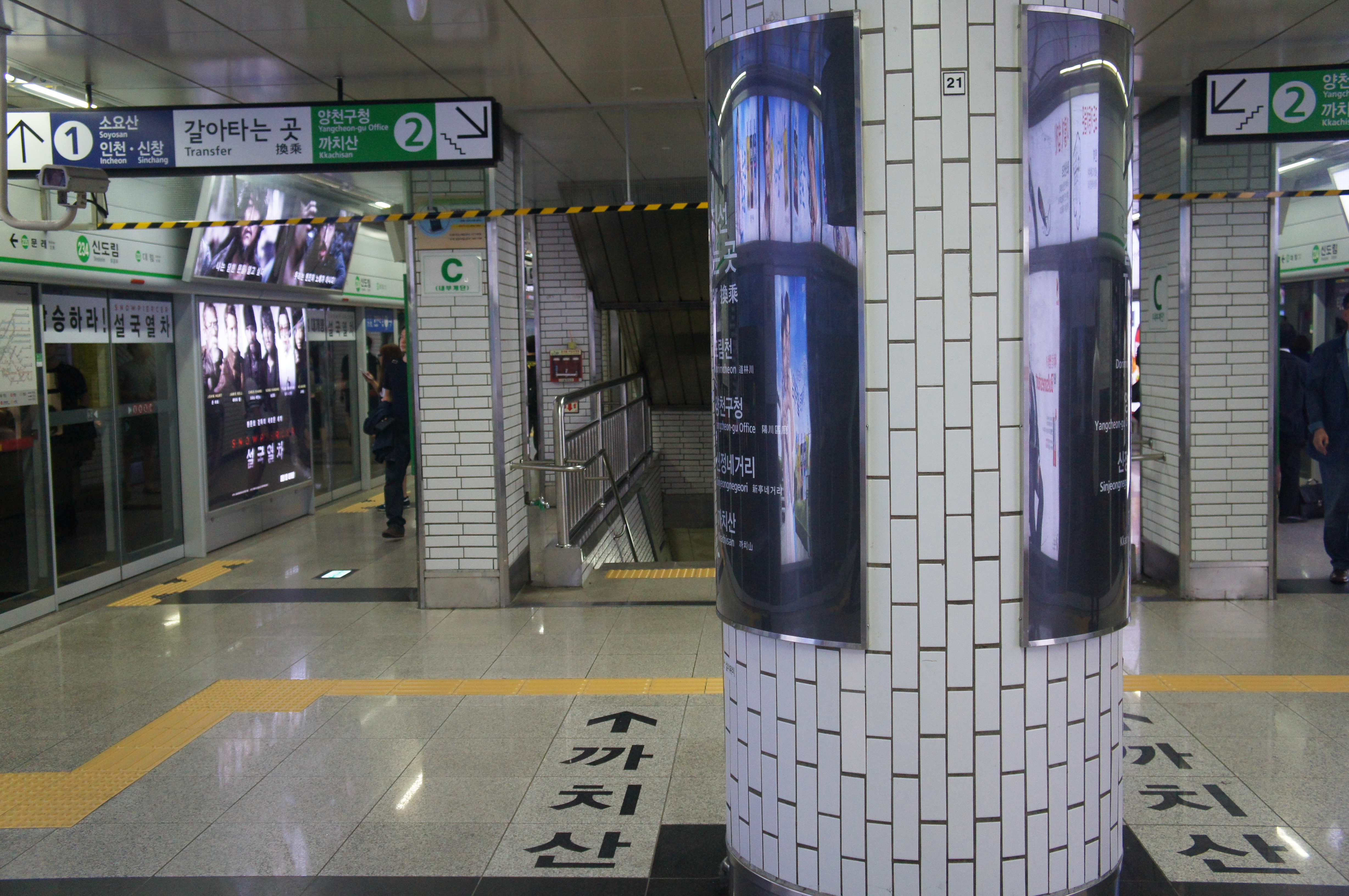 신도림역 2호선 본선 승강장